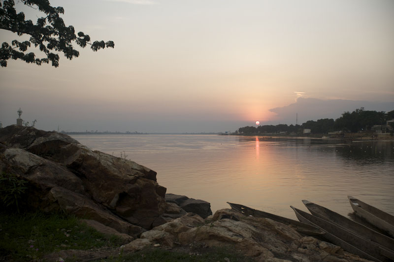 Sunset in Bangui (river Ubangi)